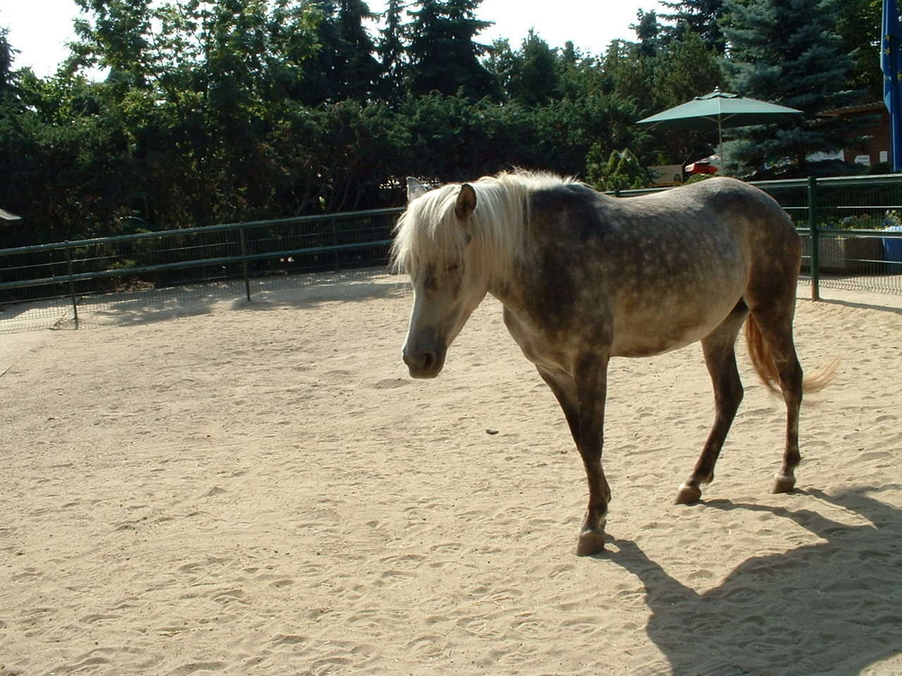 Gotlandpony01 im Oderbruchzoo Altreetz 2006